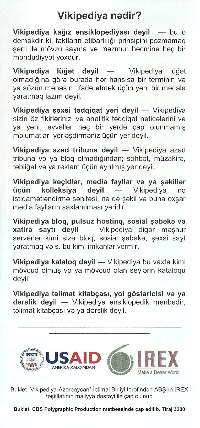 Vikipediya-Azərbaycan İB-nin ilk bukleti